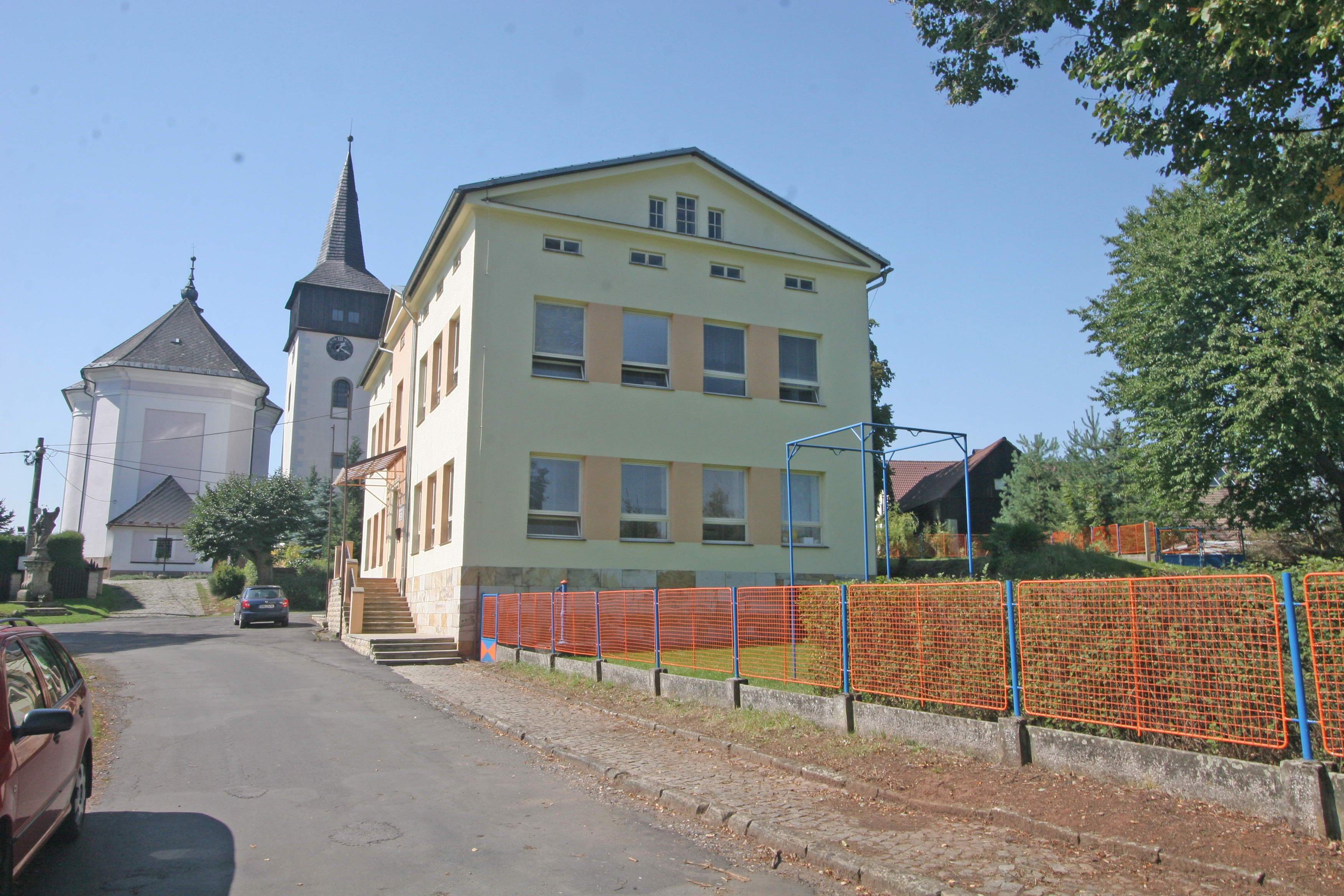 Hajnice škola